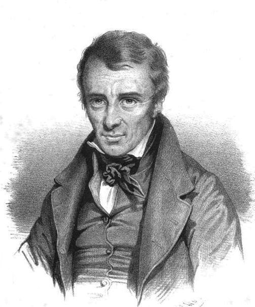 M. de La Mennais